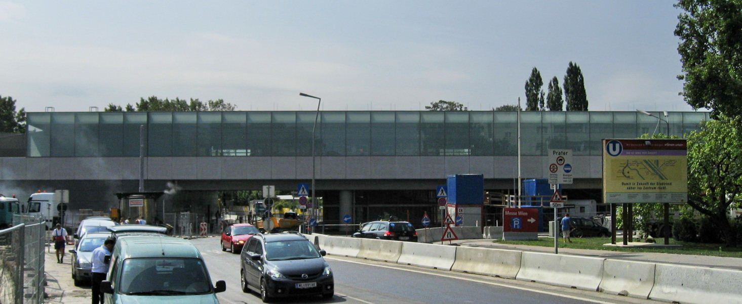 Wien U2 Station Stadion